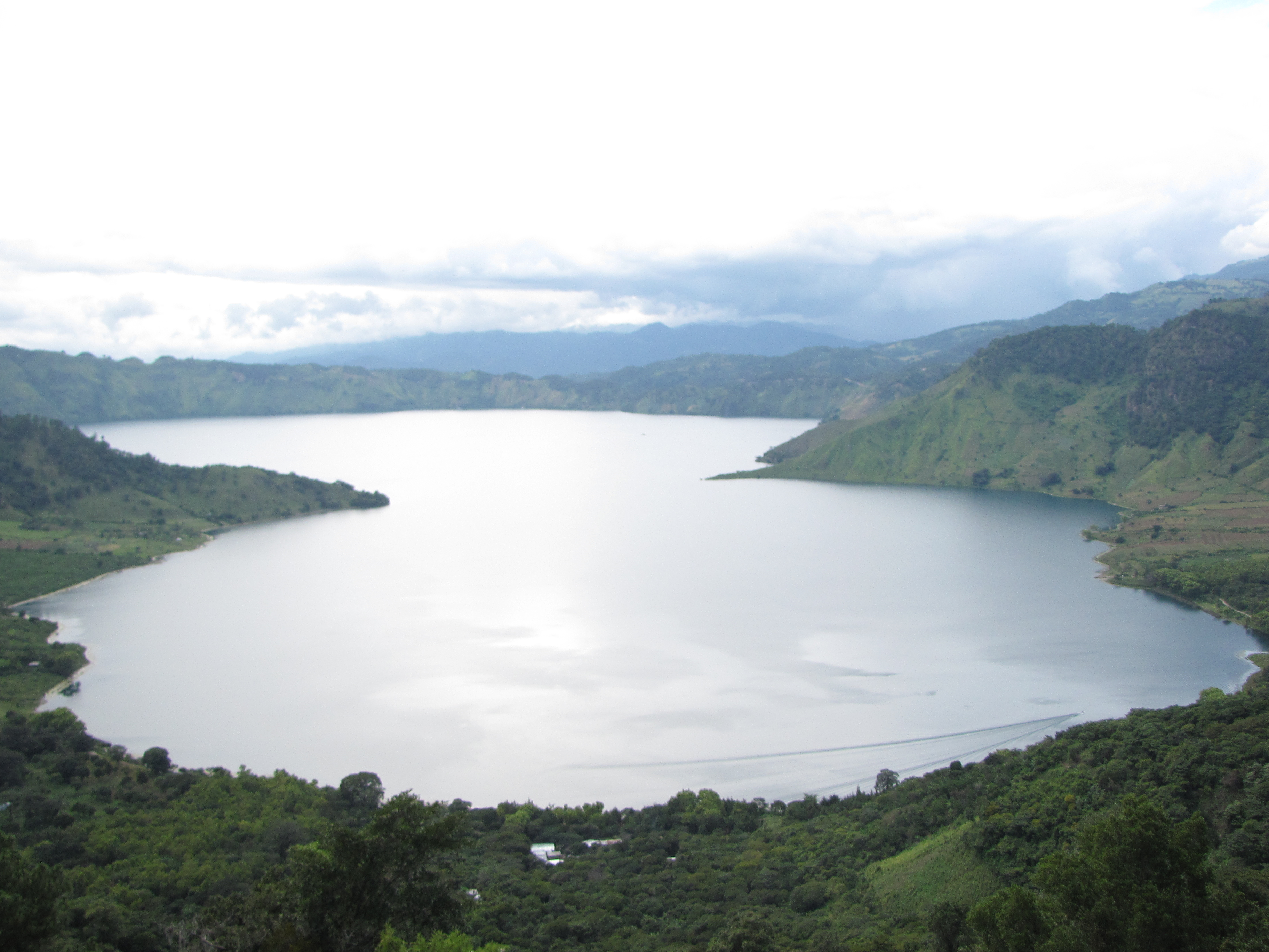 Lago de Ayarza,Ayarza,Santa Rosa, Guatemala.